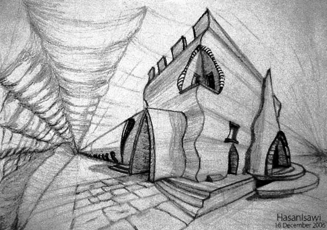 disegno a mano libera prospettiva d'angolo di un edificio